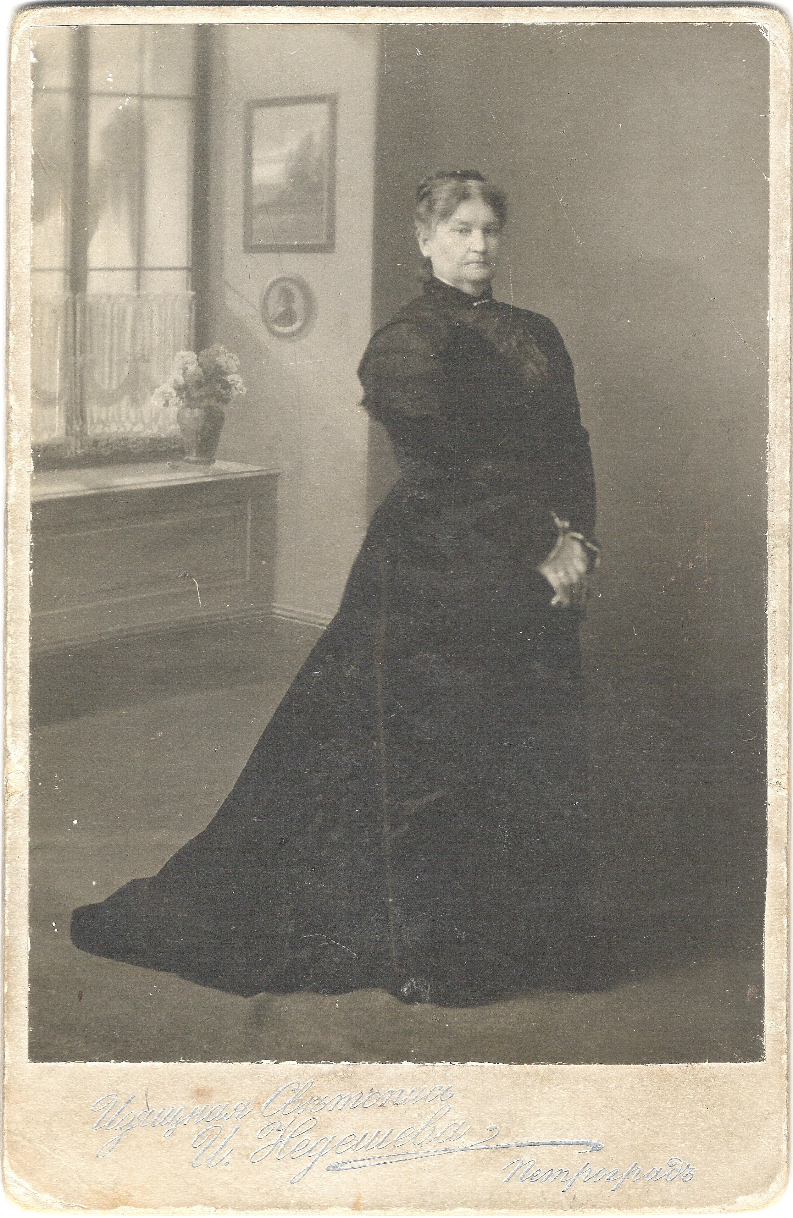 Ludwika Raftopuło z domu Witkowska - żona generała-majora Piotra Raftopuły w Piotrogrodzie w 1915 r., w żałobie po śmierci męża, po audiencji u Ich Cesarskich Wysokości Mikołaja II Romanowa i Aleksandry Romanowy.